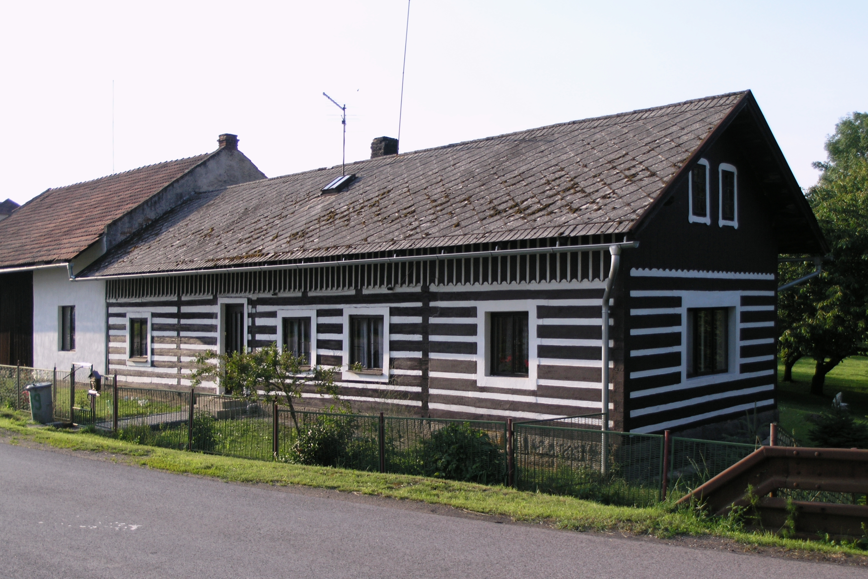 Robousy